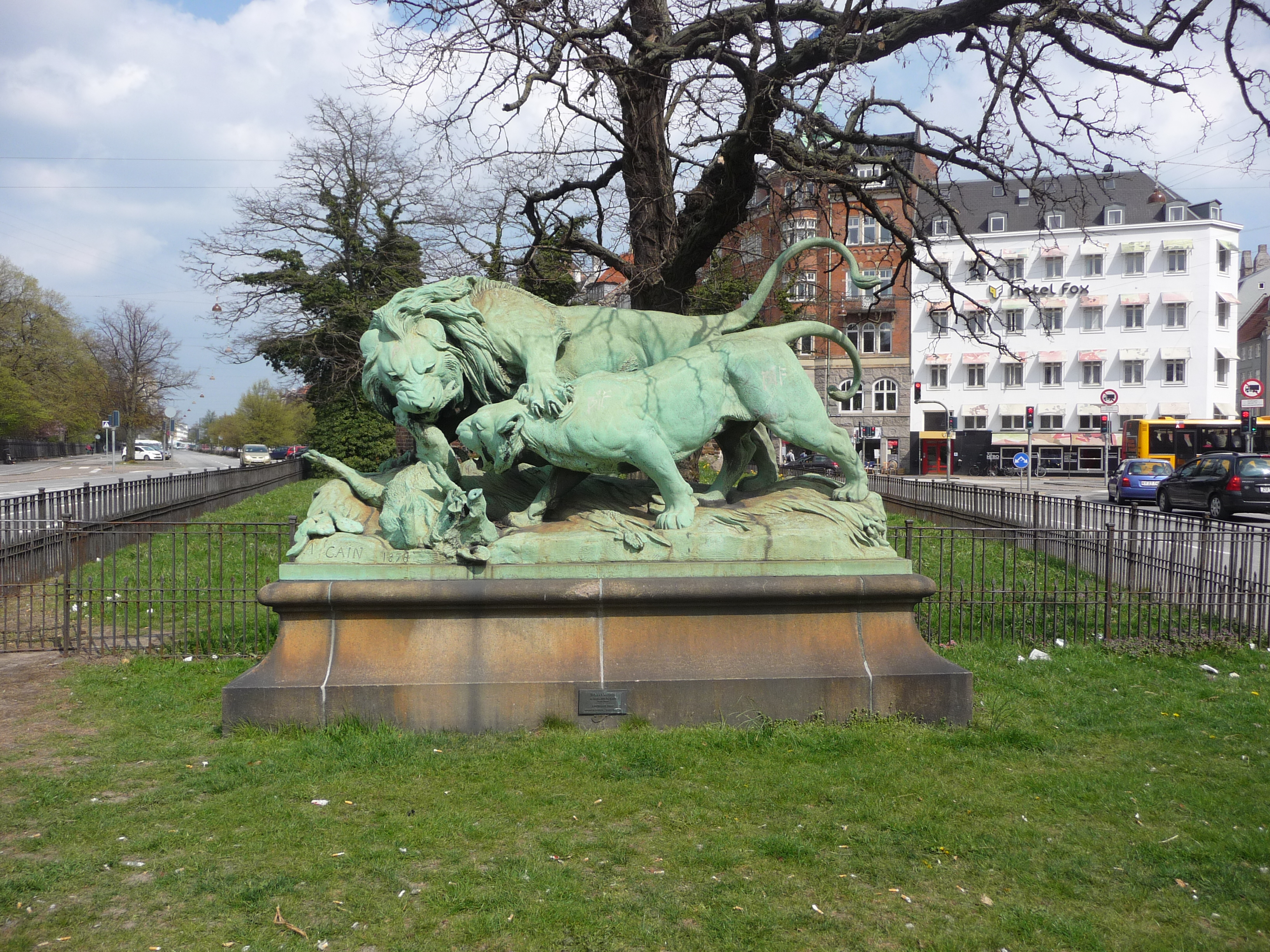 Sculpture at Karmers Plads in Copenhagen, Denmark